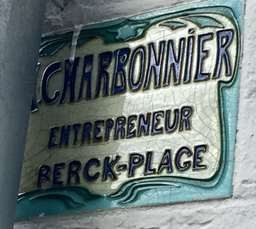 plaque apposée sur le bâtiment nouvellement construit.